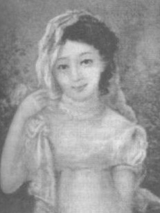 Sofia Ponomareva, Russian socialite